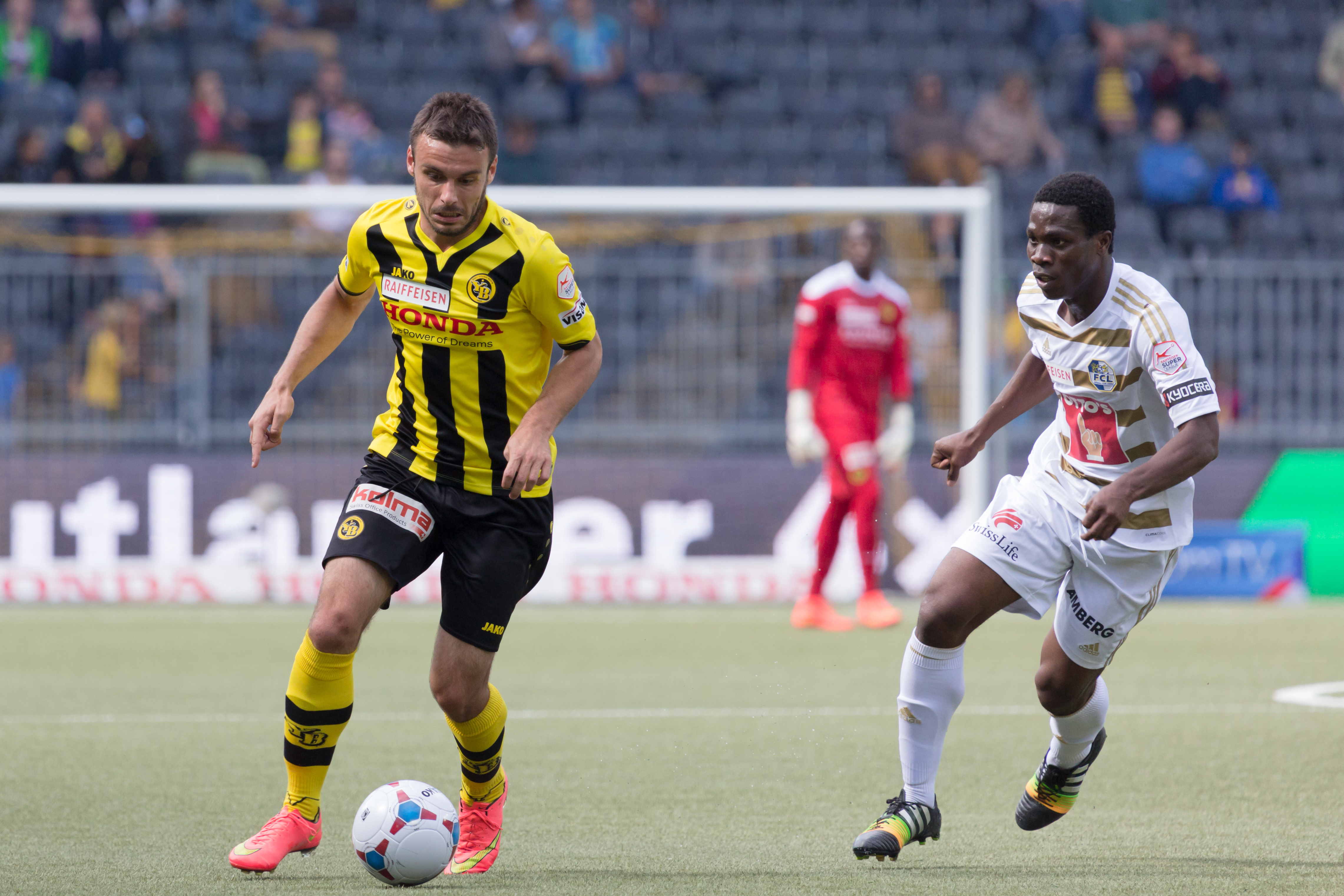 Milan Gajić und Thierry Doubaï beim Spiel des BSC Young Boys gegen den FC Luzern